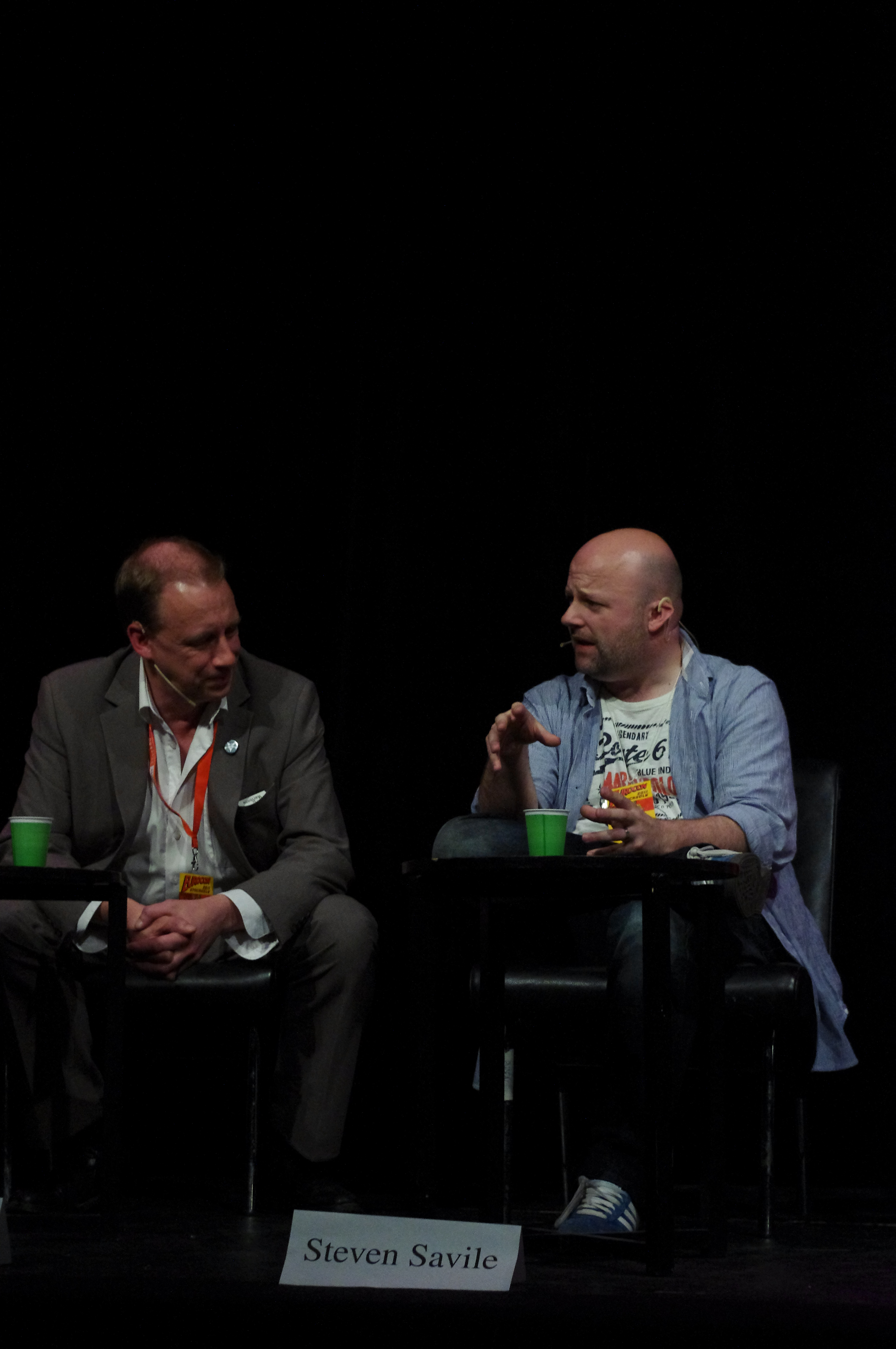 Writers Anders Fager and Steven Savile at Eurocon in Stockholm, 2011.